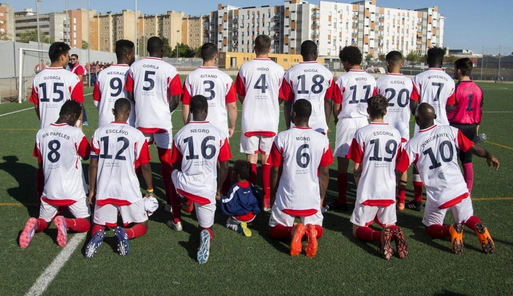 'Alma de África' futbol taldeko jokalariek euren kontrako irainak salatzeko elastikoak erakutsi zituzten prentsaren aurrean.